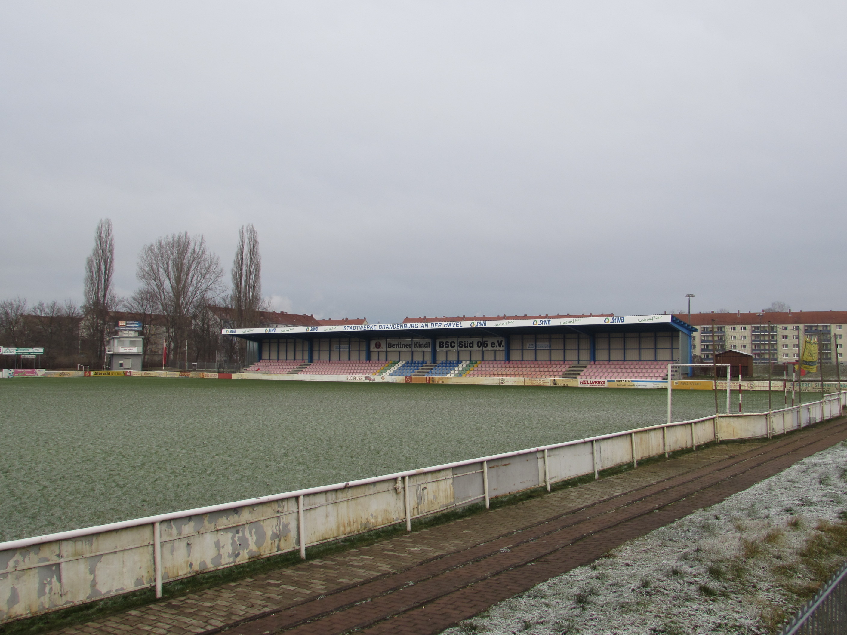 haupttribüne des zentralen fußballstadions des werner-seelenbinder-sportplatzes